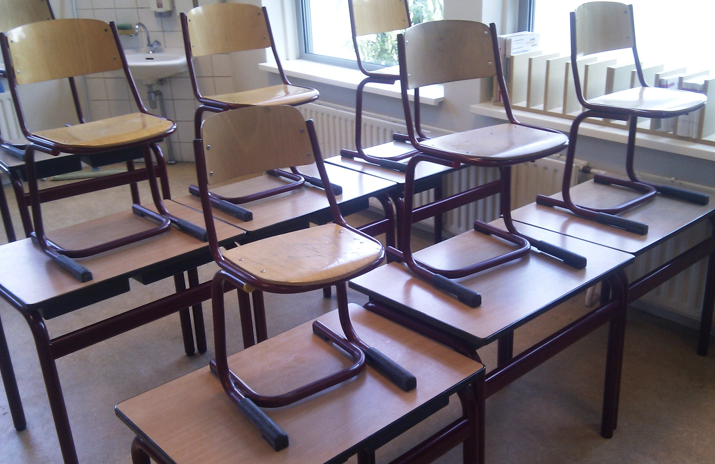 Leeg klaslokaal.